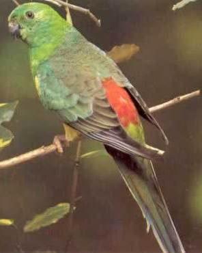 Psephotus_haematonotus, Певчий попугай красноспинный